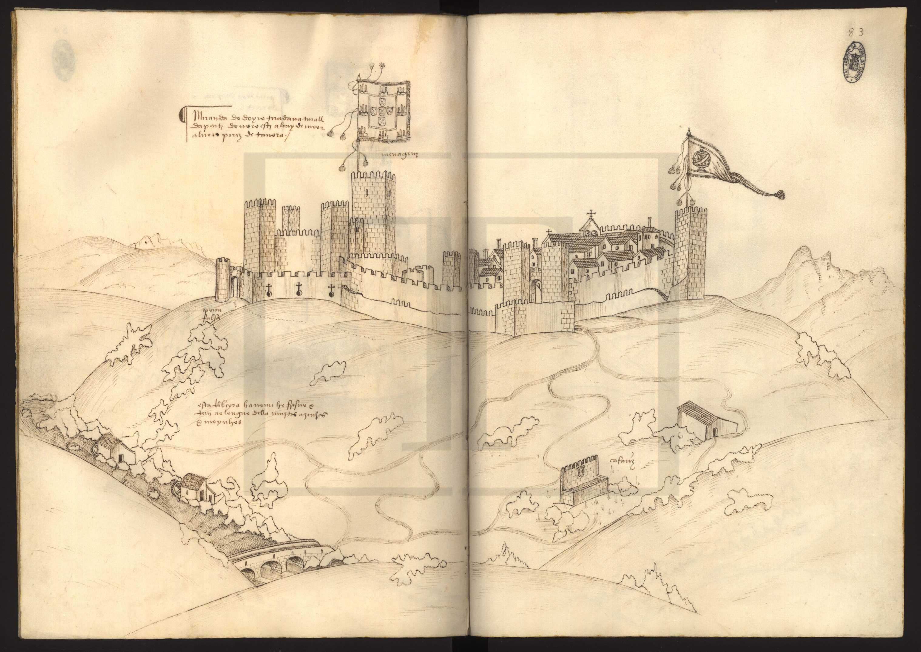 Livro das Fortalezas 83 - Miranda do Douro